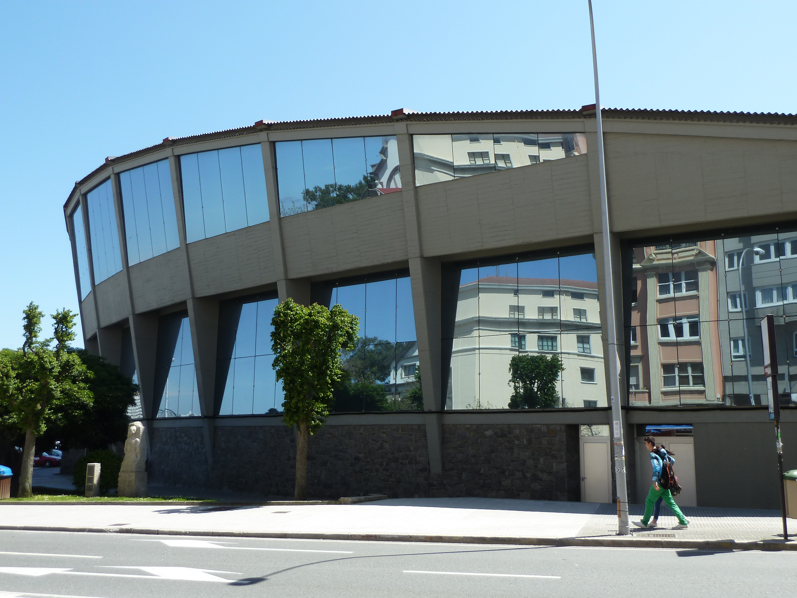 Pazo dos Deportes de Riazor na cidade da Coruña.